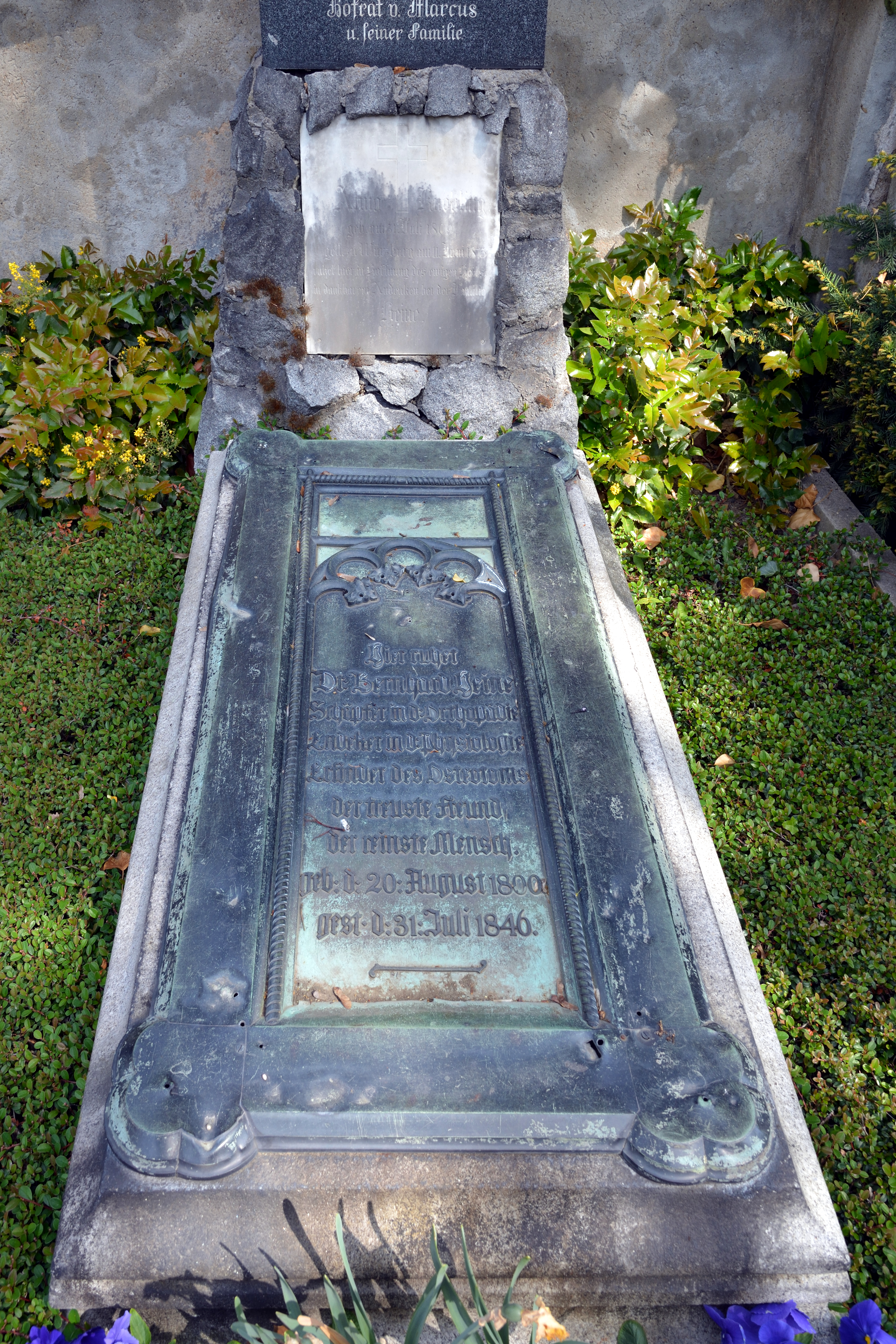 Impressionen vom Hauptfriedhof Würzburg Grab von Bernhard Heine